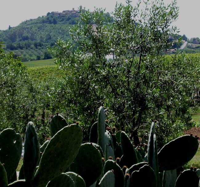 Panorama di Montiano (GR)